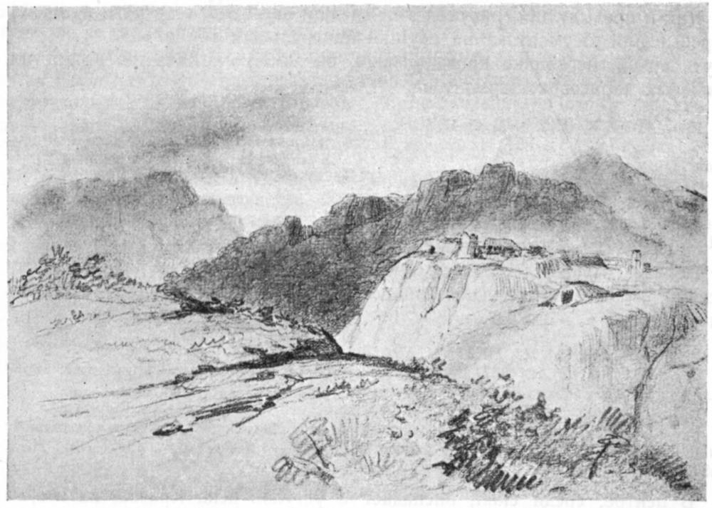 ВИД ГОРСКОГО СЕЛЕНИЯ Рисунок карандашом Лермонтова, 1840 г. (Альбом Лермонтова, л. 18) Публичная библиотека, Ленинград